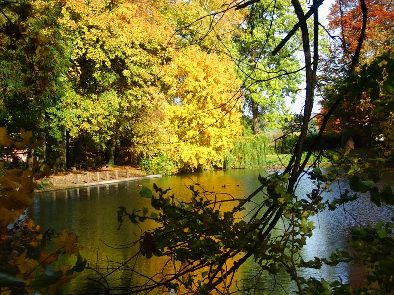 Blick auf den Küchenteich